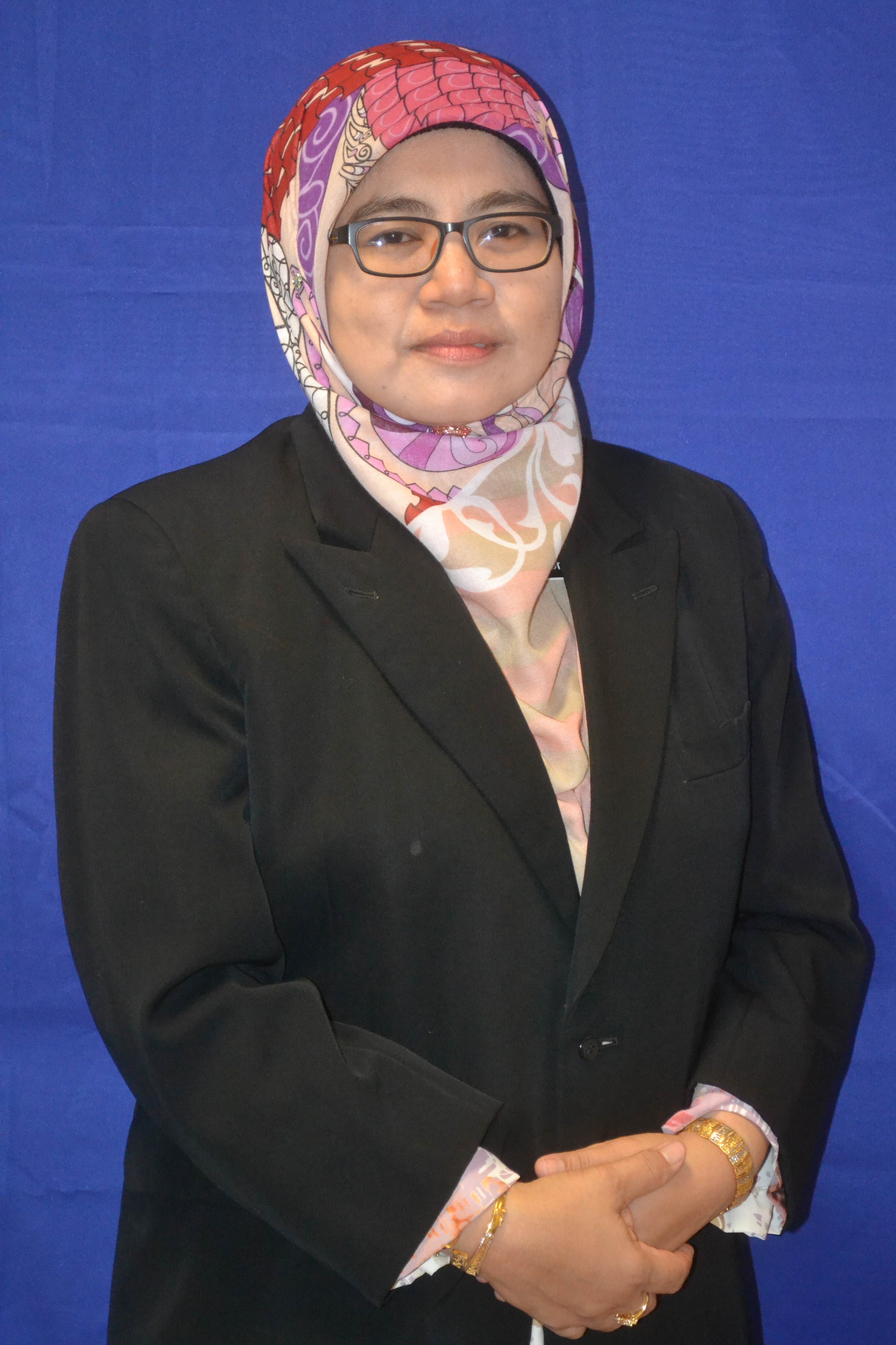 Gambar Guru Besar